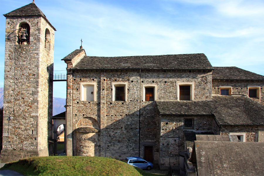 Parrocchiale di Santo Stefano a Quarna Sopra (VB)